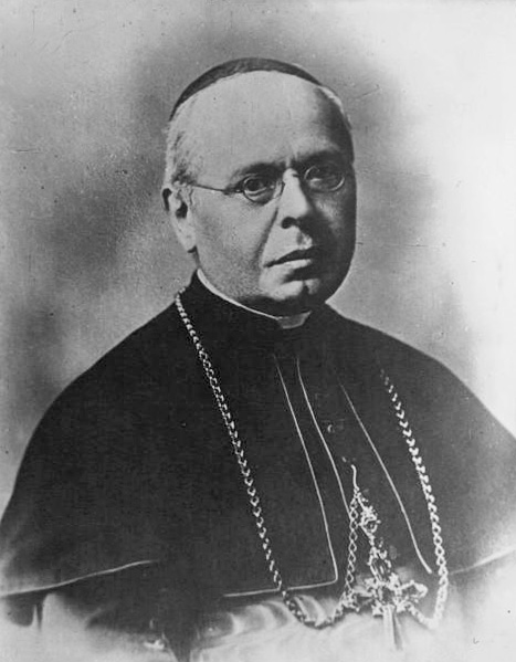 Cardinal Vico (photographie de presse)